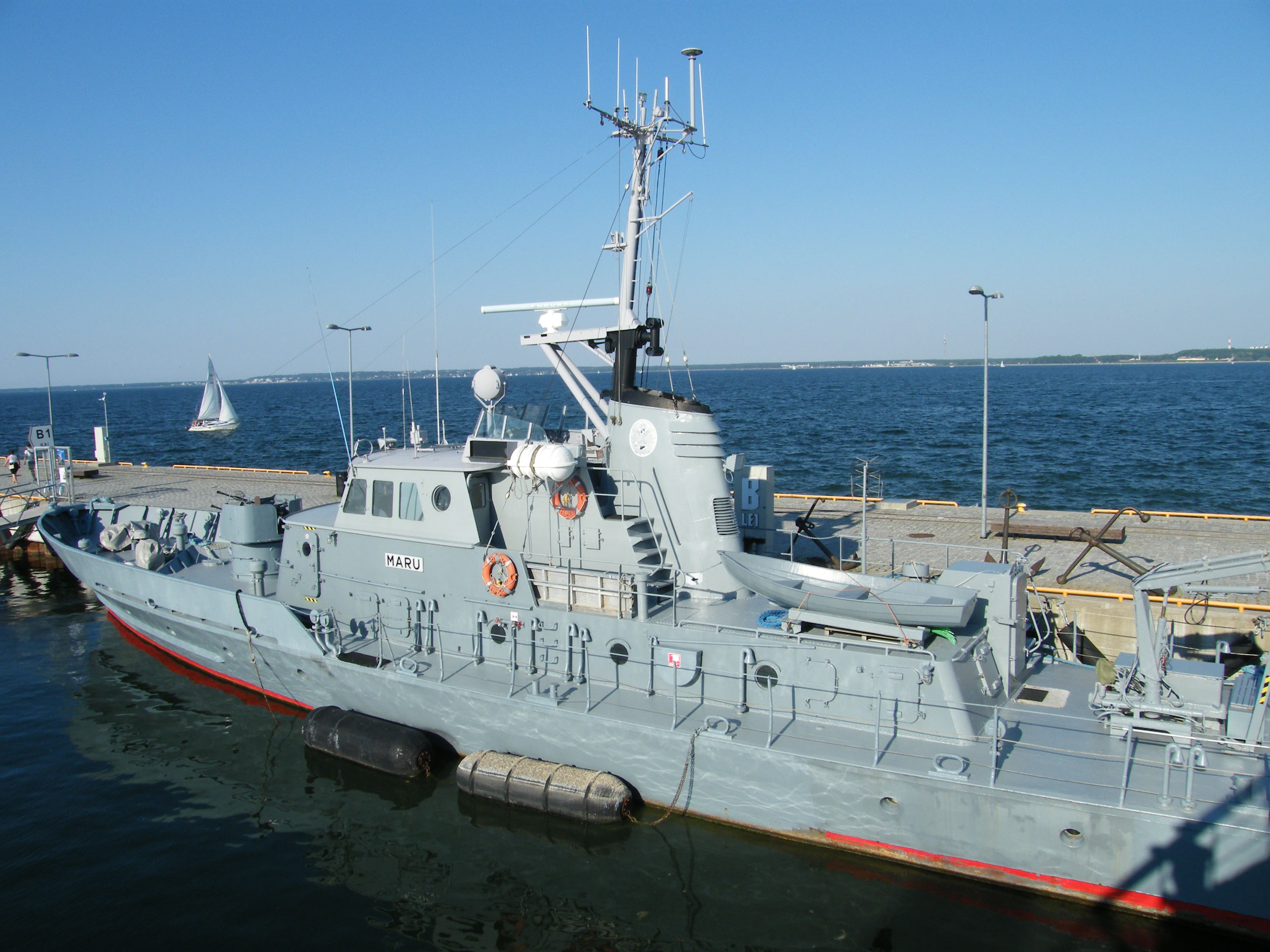 PVL-106 Maru